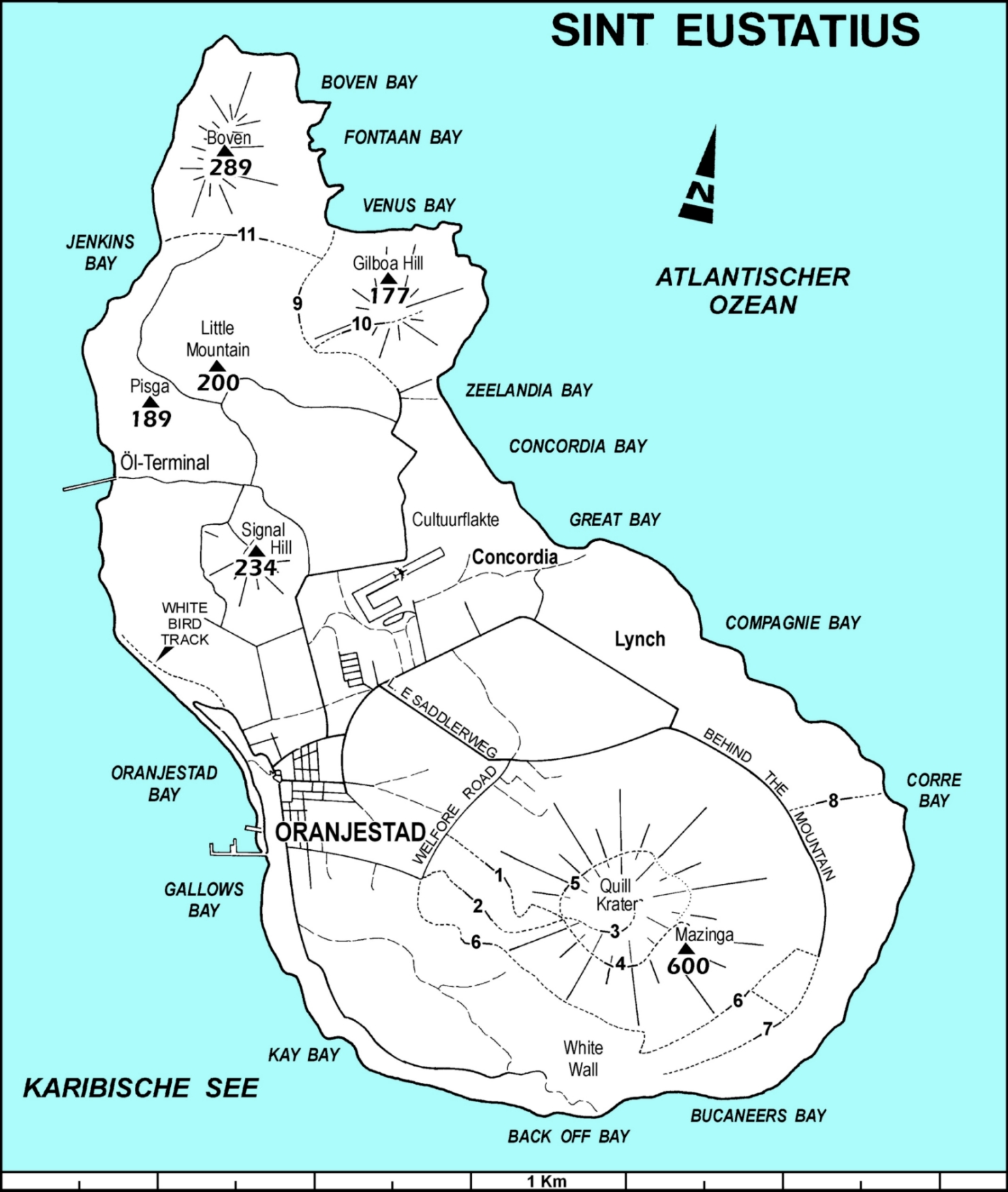 Übersichtskarte von Sint Eustatius